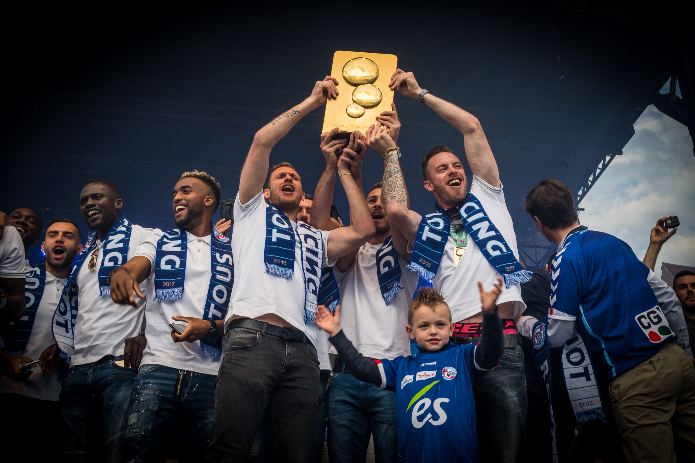 Le RCSA fête son accession en Ligue sur la place Kléber à Strasbourg le 20 mai 2017